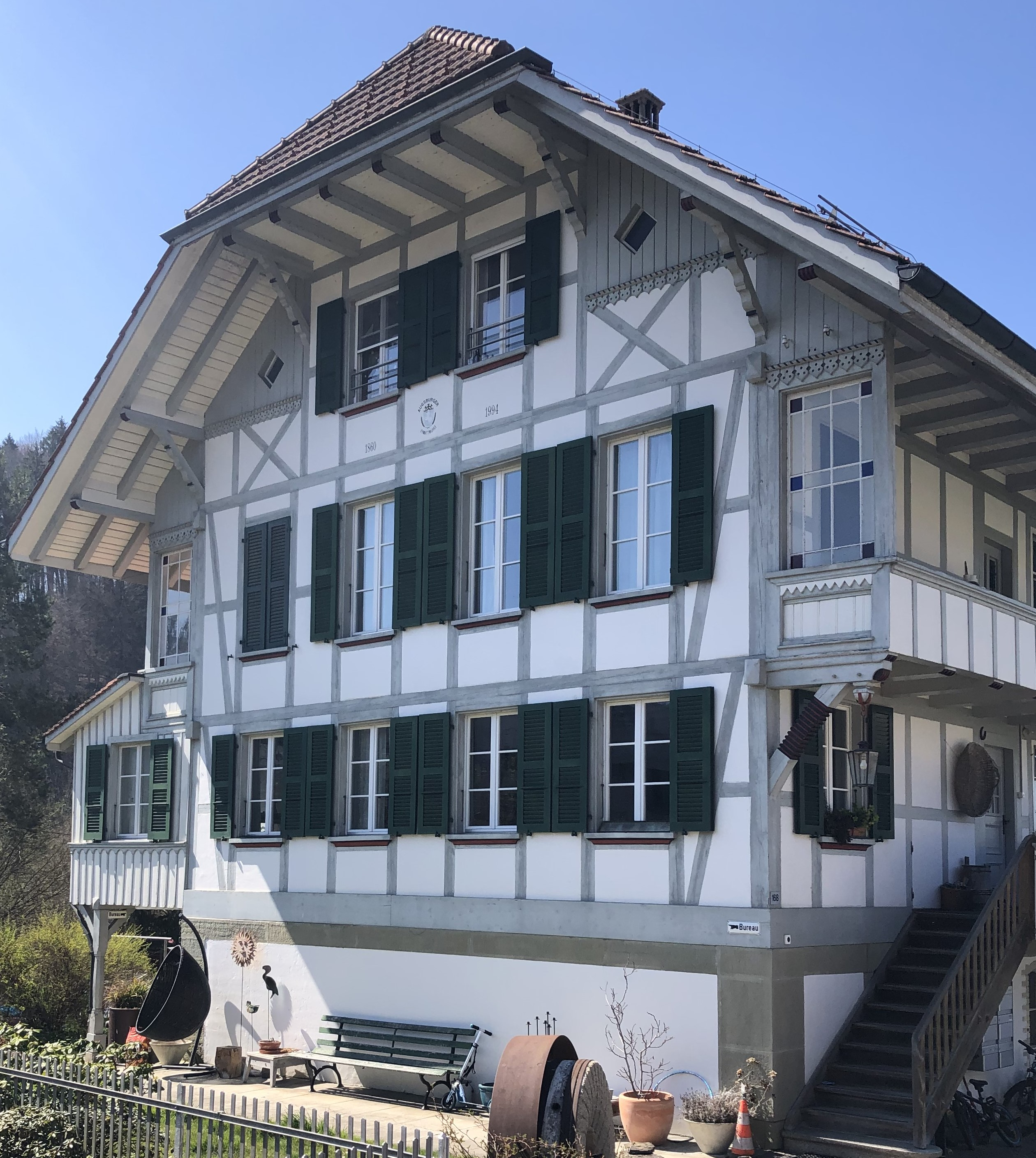 Eymatt Mühle Haupthaus1